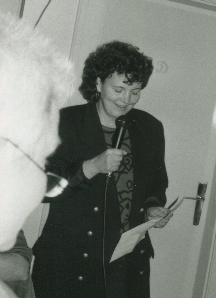 Traute Müller, ehmalige Landesvorsitzende SPD Hamburg